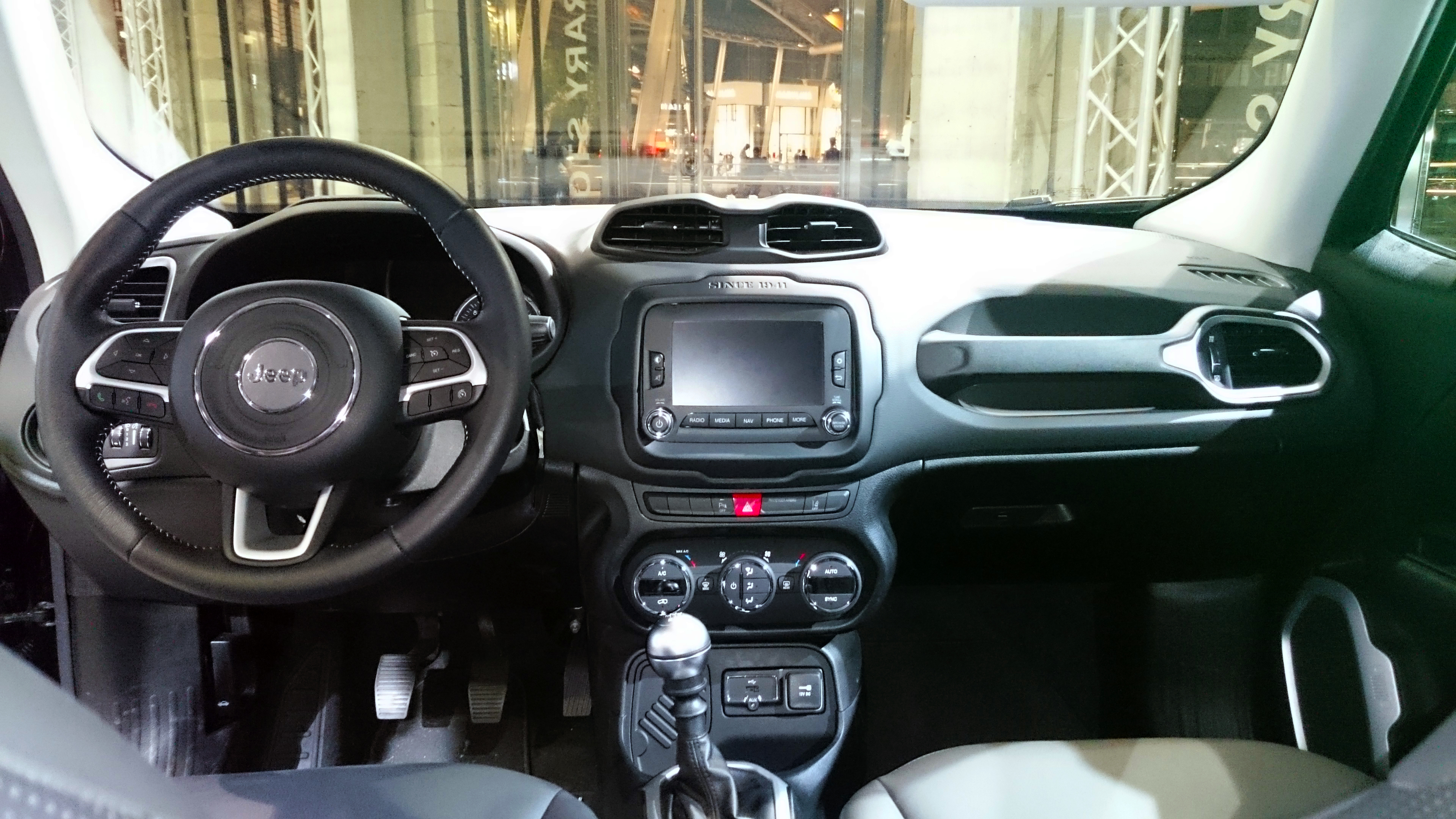 Showroom Jeep in Piazza Gae Aulenti (Milano)